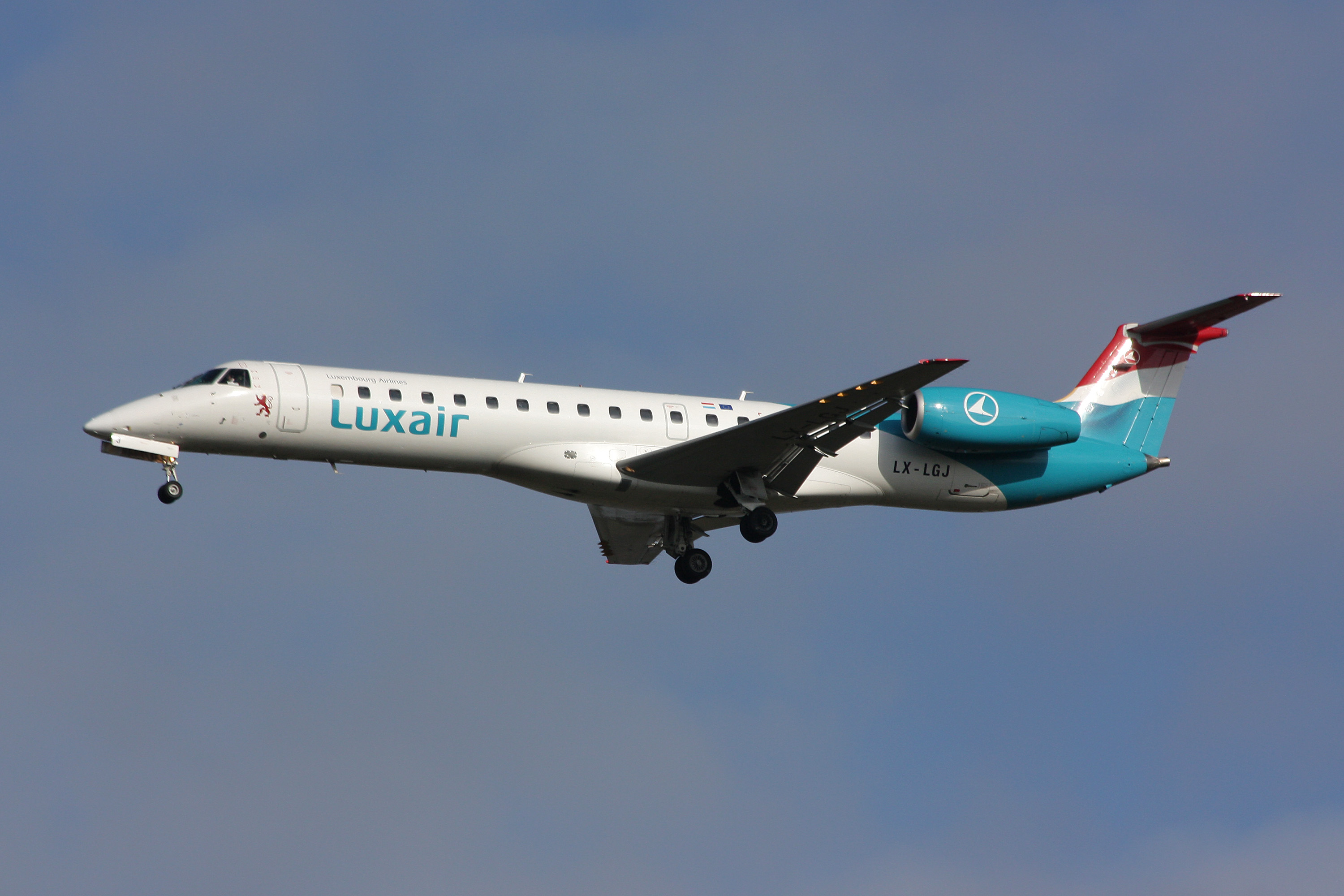 Embraer 145 de la compagnie luxembourgeoise Luxair en finale pour la 27R à Paris-Charles-de-Gaulle (LFPG/CDG).